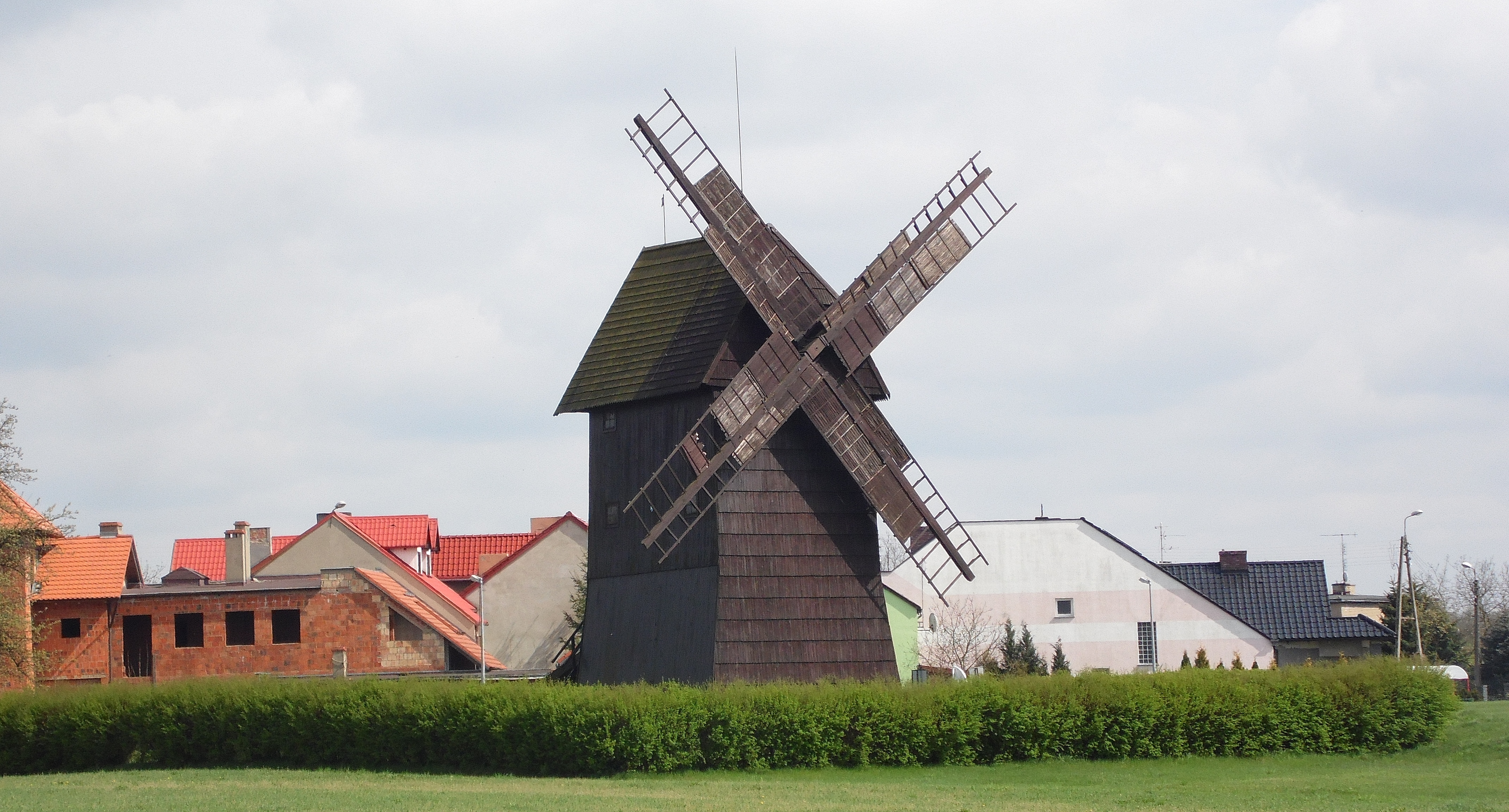 Rydzyna, os. „Młyńska Górka”, ul. Wyspiańskiego - wiatrak koźlak "Józef" z XIX w.